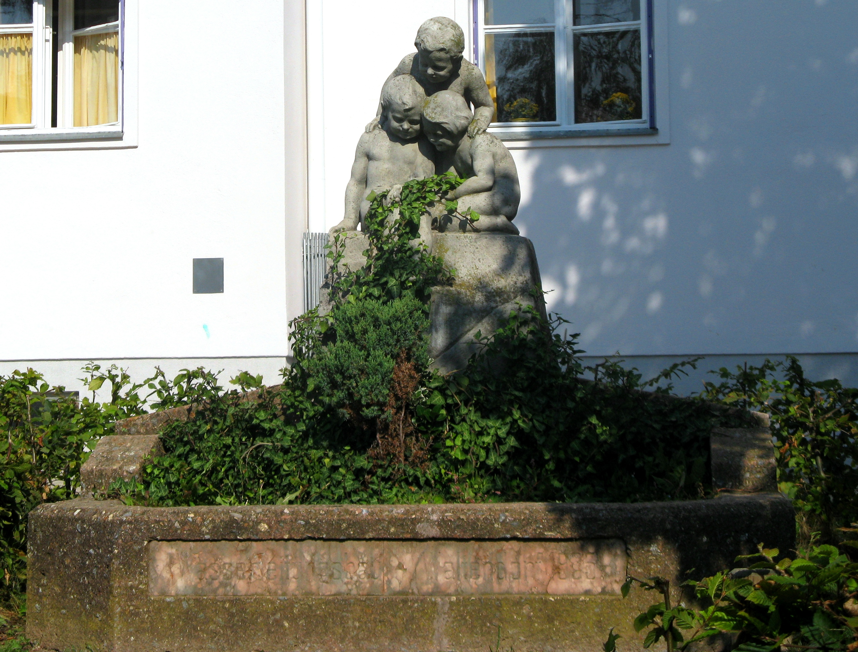 Froschkönigbrunnen